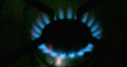 foto jpg del butano en mi casa.